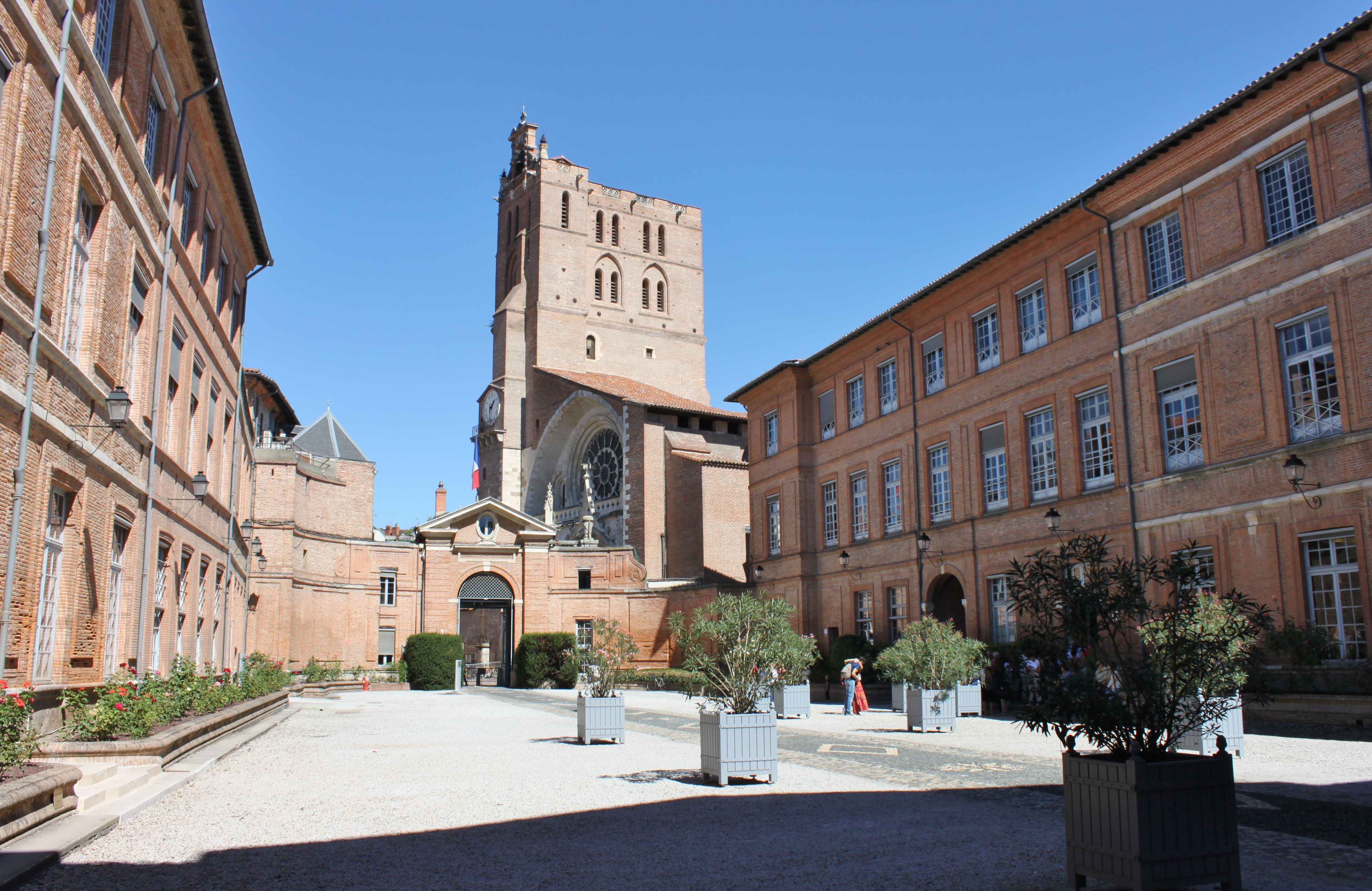 Toulouse - Le clocher de la cathédrale depuis la cour de la préfecture